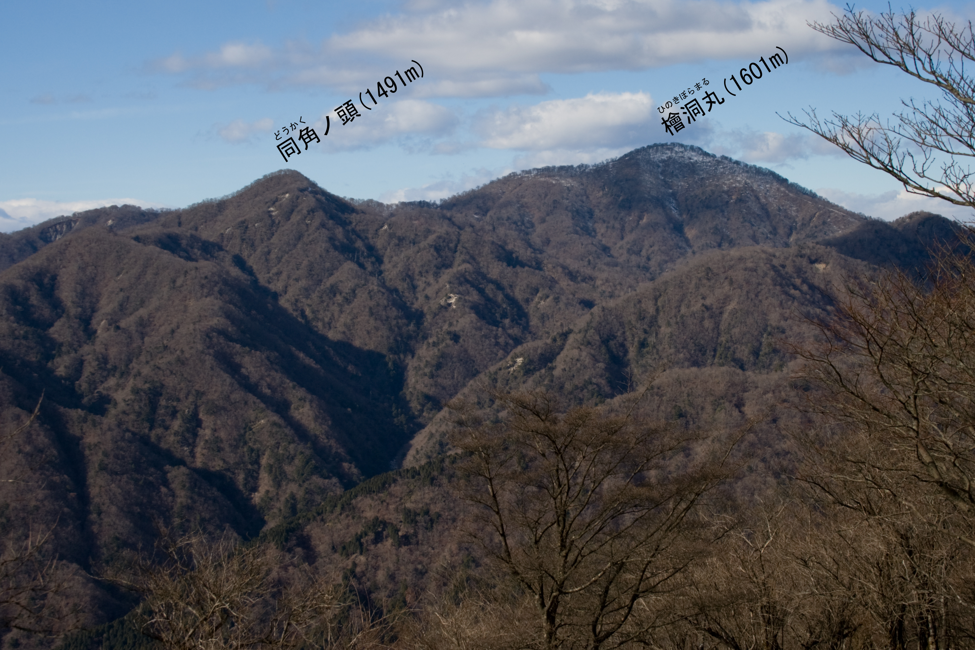 鍋割山より望む同角ノ頭と檜洞丸